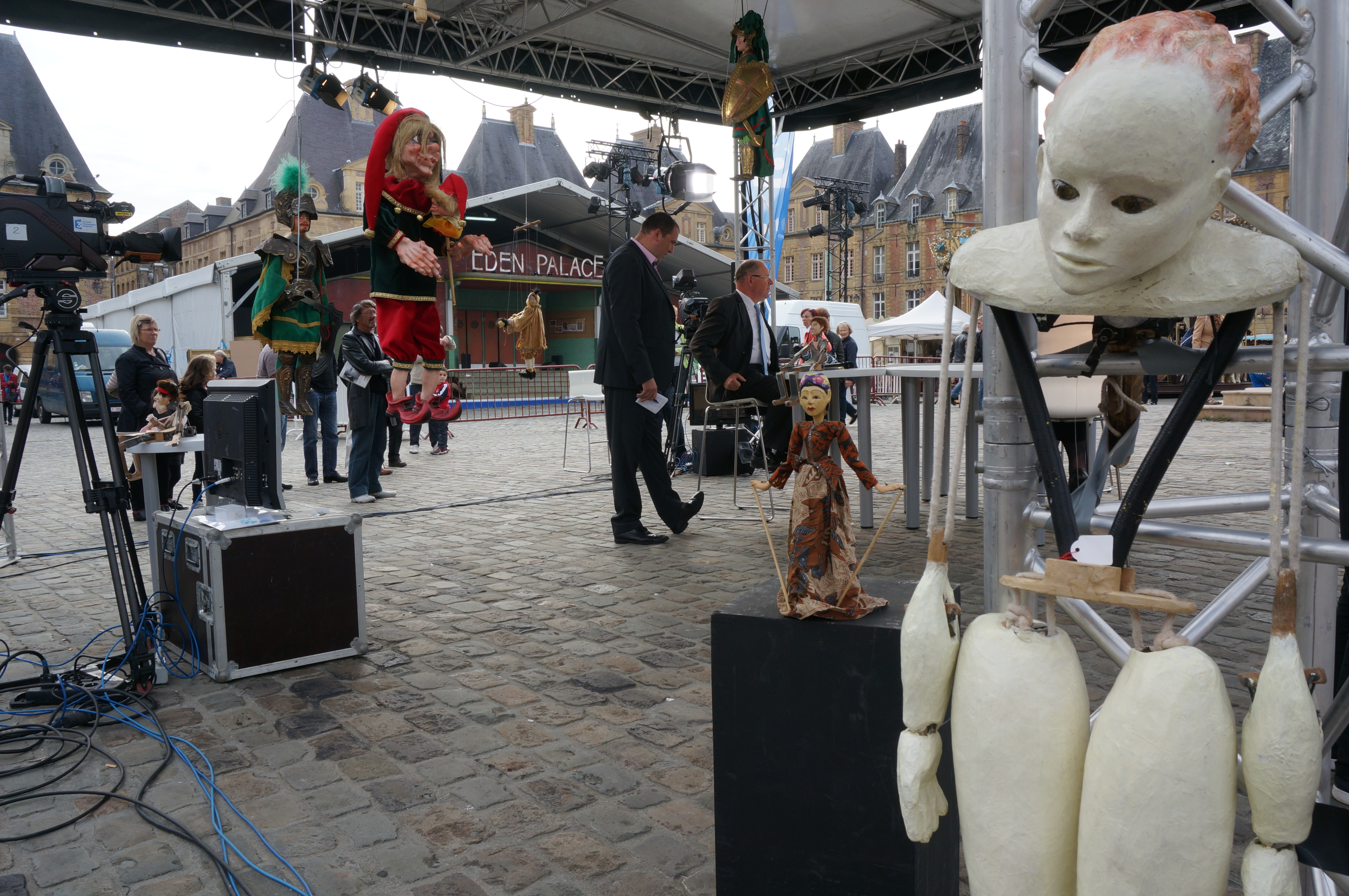 Plateau FR3 lors du Festival mondial des théâtres de marionnettes 2013 .